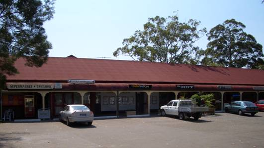 Bonnet_Bay